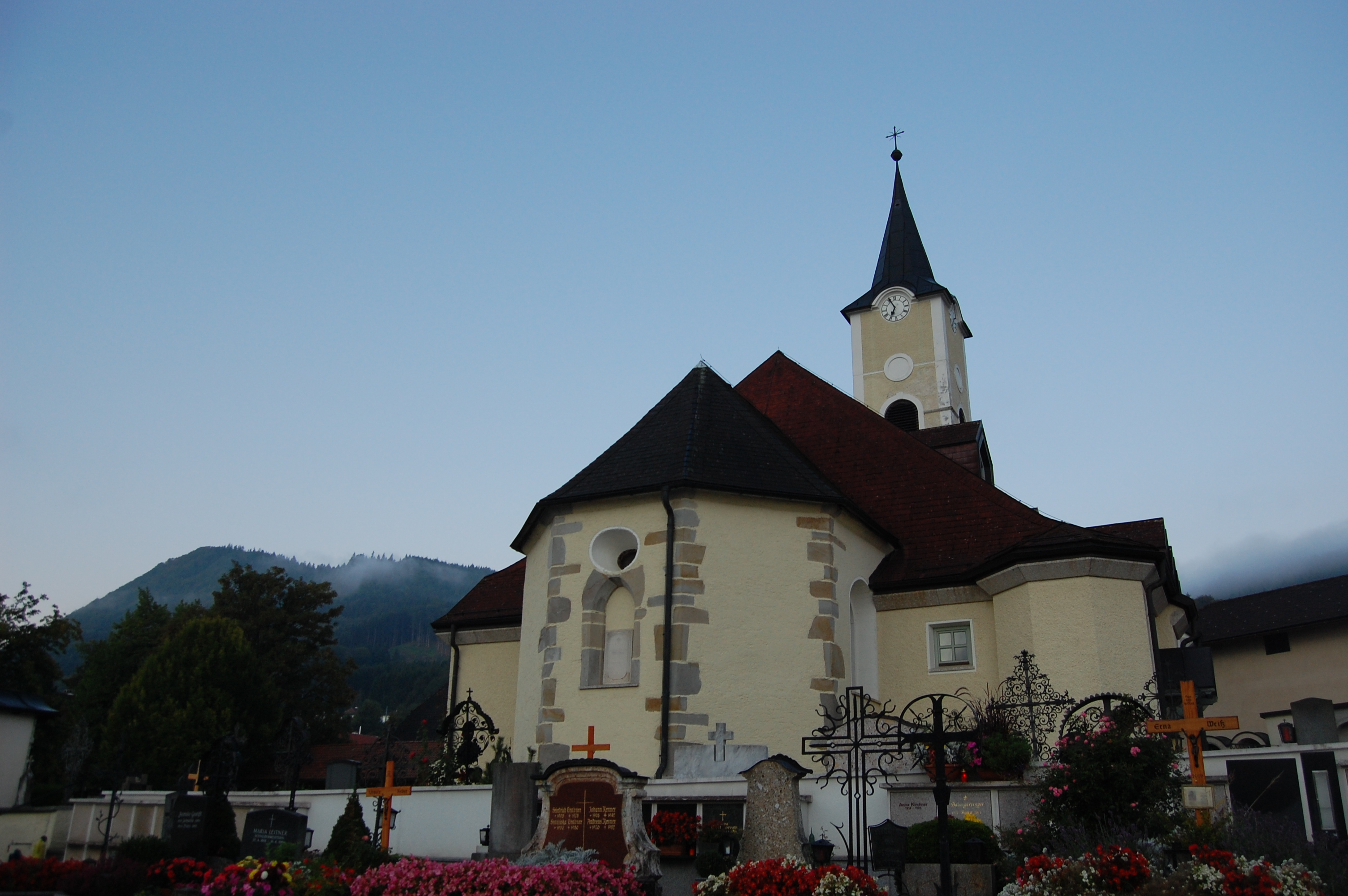 Nußdorf am Attersee, Pfarrkirche mit Friedhof.ObjektID 59223 In Nußdorf dürfte bereits im 14. Jahrhundert eine Filialkirche von Traunkirchen bestanden haben, als diese 1332 dem dortigen Kloster der Benediktinerinnen einverleibt wurde. Nach der Reformation und Gegenreformation wurde im Jahre 1783 eine eigenständige katholische Pfarre gegründet. Das gotische Kirchengebäude musste 1816-1818 wegen starker Bauschäden umgebaut werden. Der Altarraum blieb erhalten und der Turm wurde neu errichtet. Beide bestehen im Wesentlichen bis heute.(Aus der GemeindeHP)